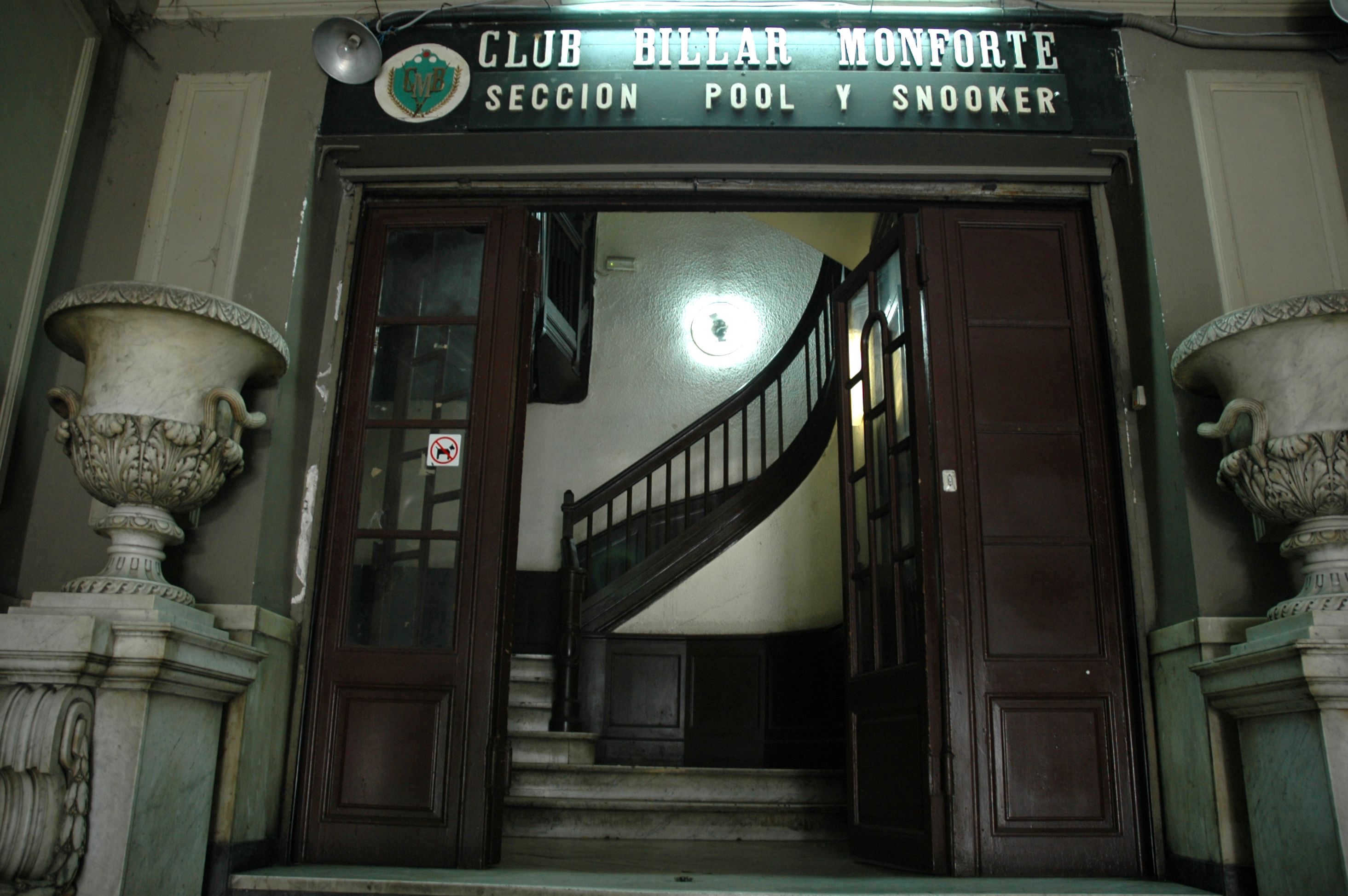 Billar al Teatre Principal de Barcelona